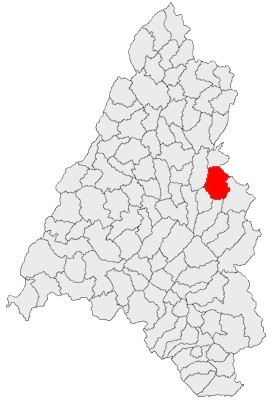 Categorie:Hărţi ale judeţului Bihor